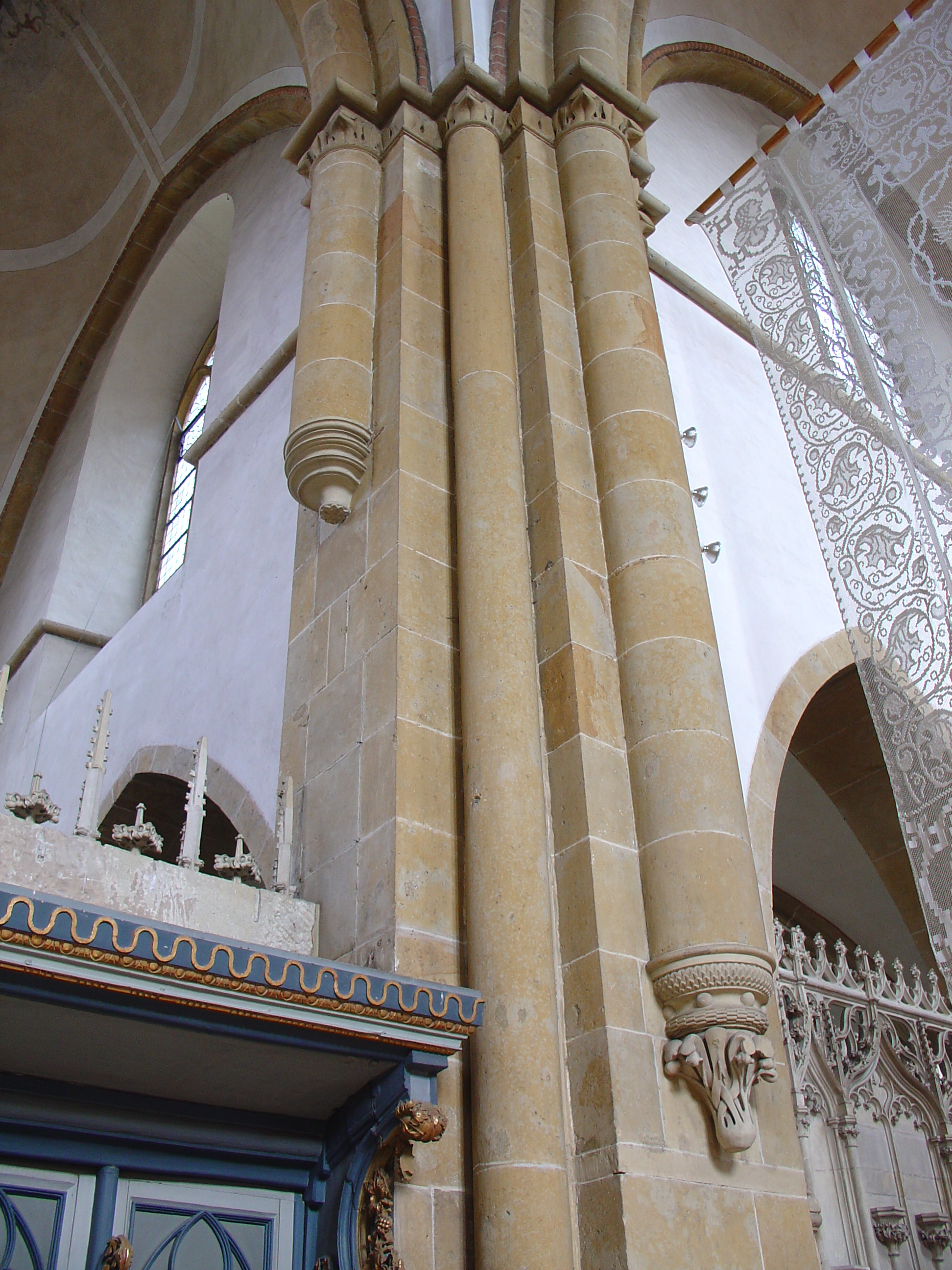 Marienfelder Pfeiler: Kreuzförmiger Pfeilerkern mit halbrunden Vorlagen